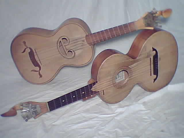 Fotografia de uma viola beiroa (em baxo) e bragesa (em cima)